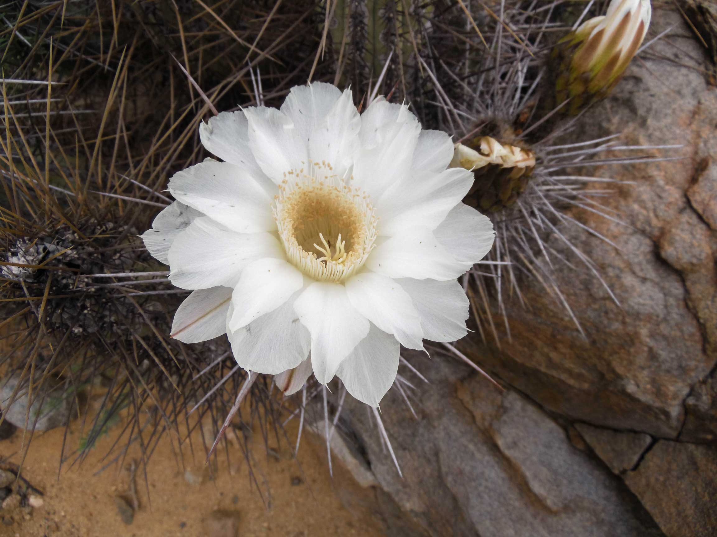 Flor de Copao (Eulychnia acida). Parque nacional Llanos de Challe, Región de Atacama, Chile.